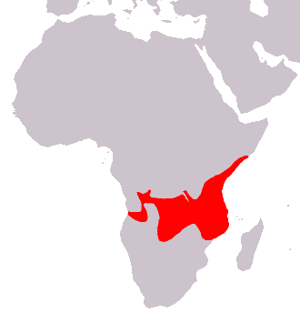 Carte de répartition du babouin cynocéphale (Papio cynocephalus).